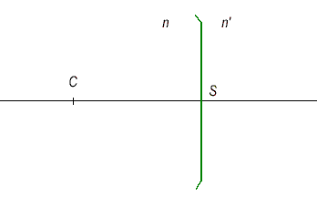 Schéma de base du dioptre sphérique dans conditions de Gauss (schéma personnel) Catégorie:Schéma de physique